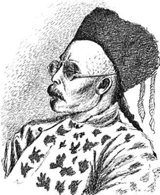 Liu Darin l'amban de Khotan, dans « À travers l'Asie », un livre de Sven Hedin